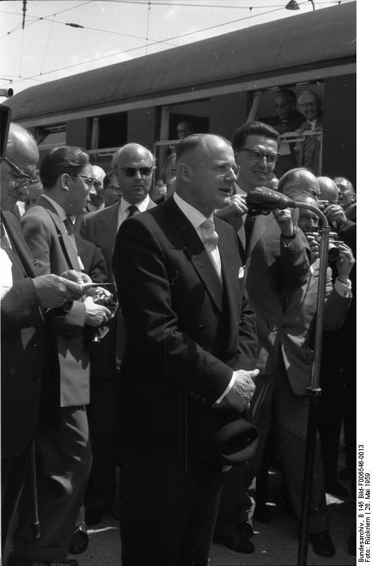 Vilshofen/Passau: Die Festgäste werden durch die Oberbürgermeister und Landräte begrüßt